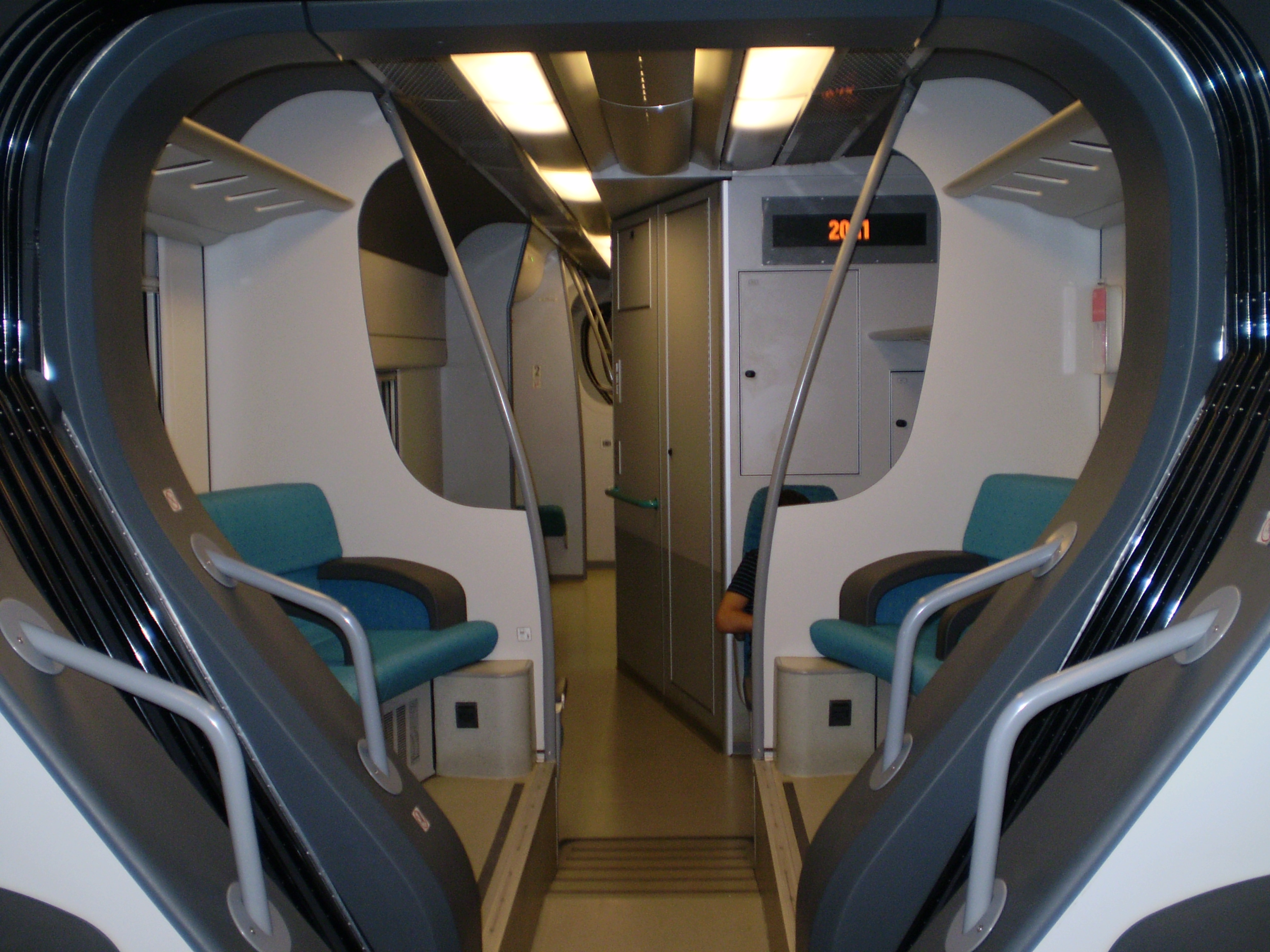 L'interno di un treno della Alstom, modello "Minuetto"